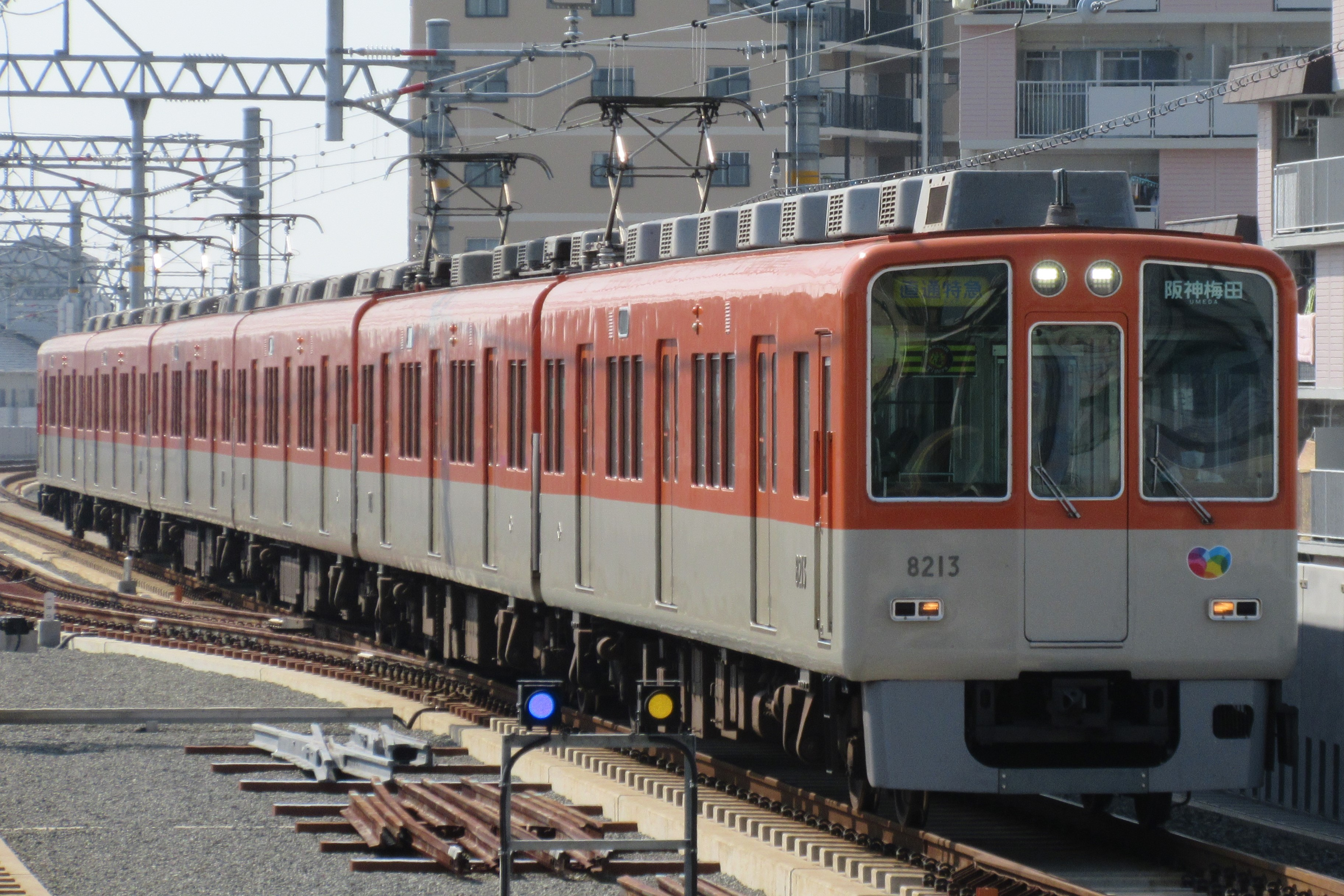 阪神電鉄8213(西新町駅にて)